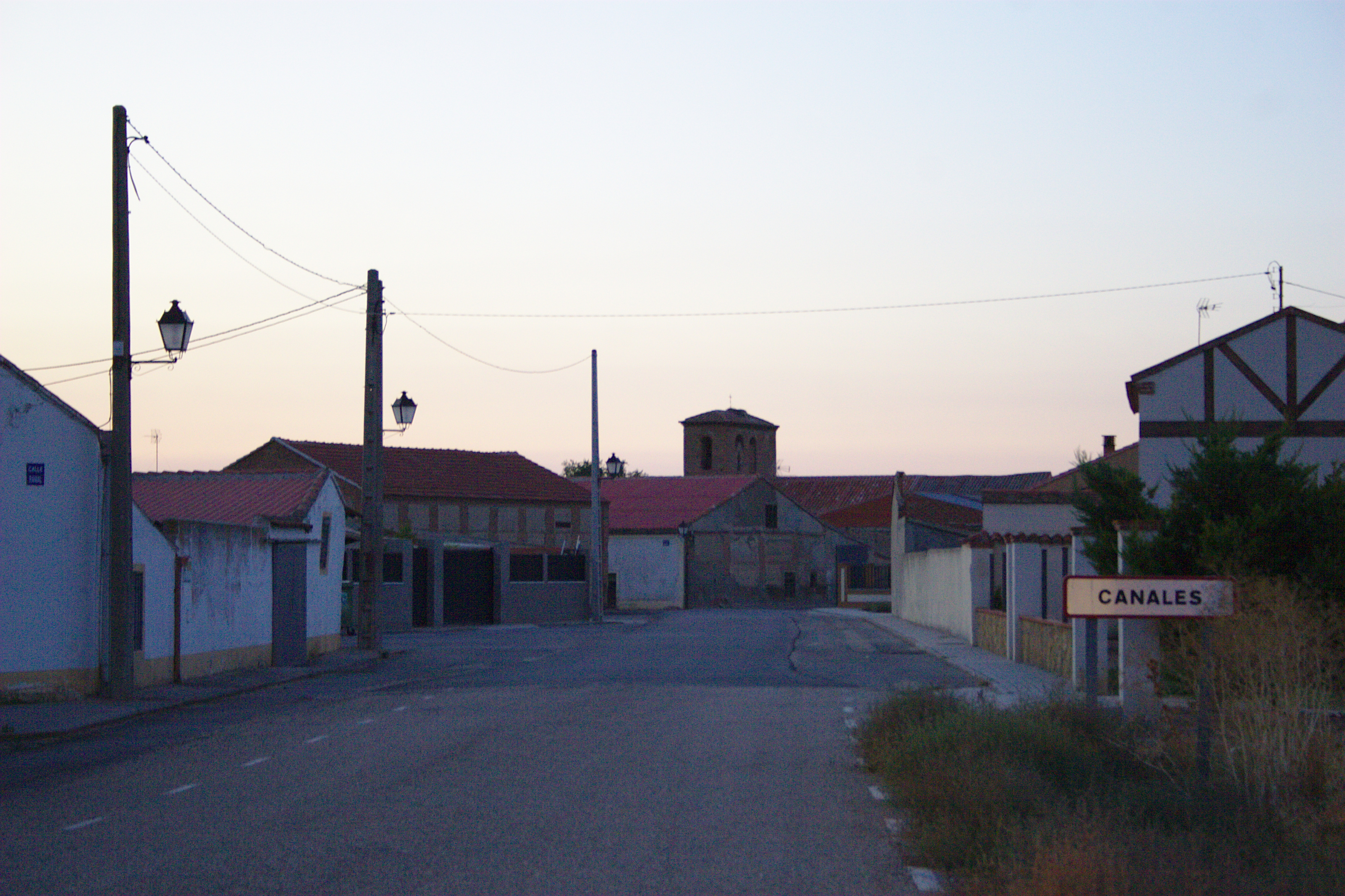 Canales